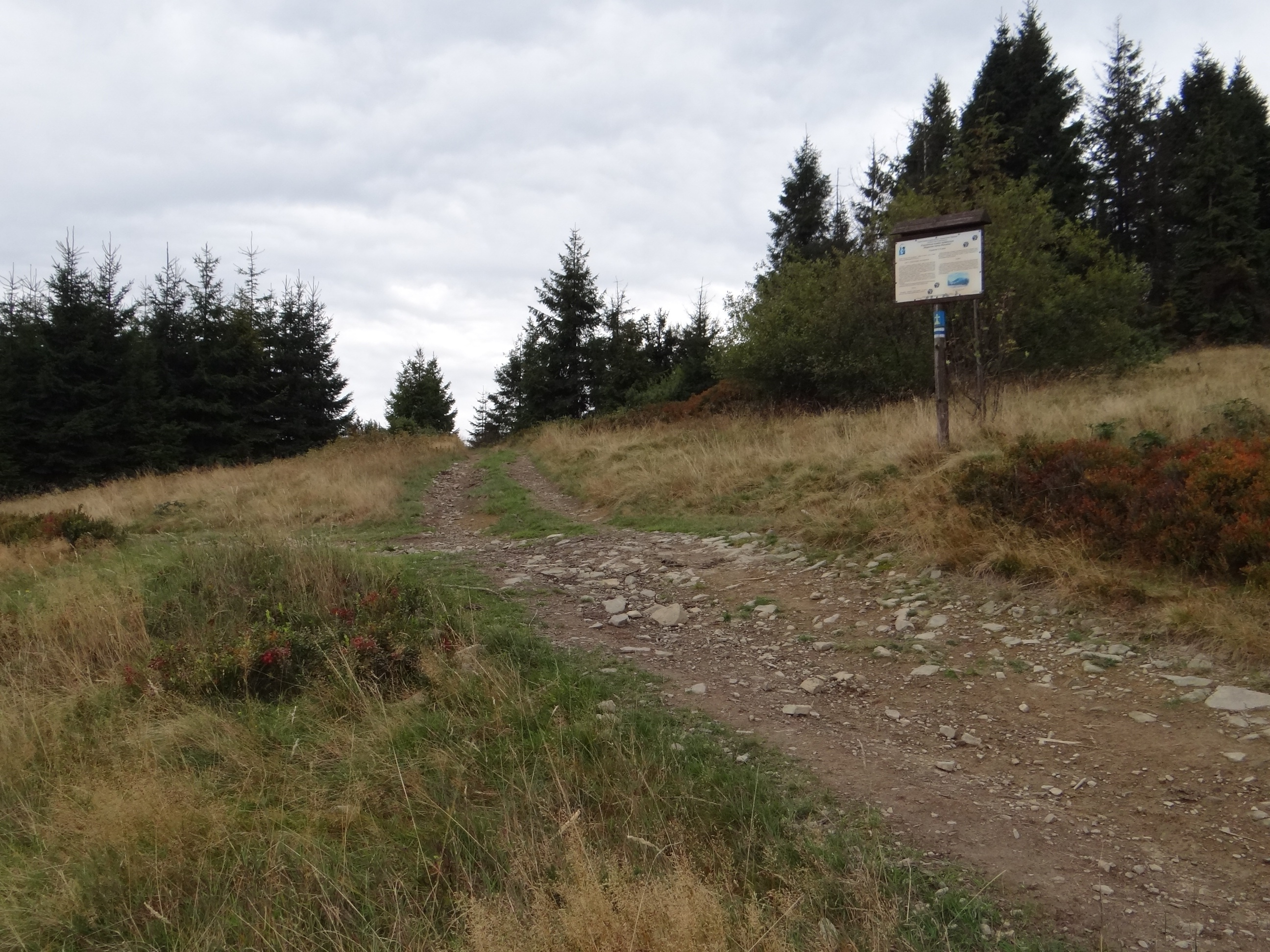 Polana na grzbiecie Prusowa i tablica ścieżki edukacyjnej